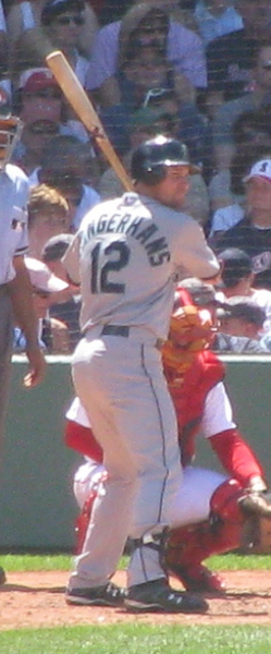 Ryan Langerhans